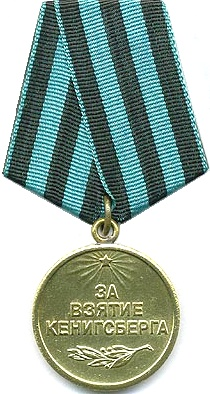 Soviet Medal "For The Capture Of Königsberg"